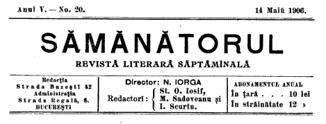 Sămănătorul logo for issue no. 20, dated May 14, 1906